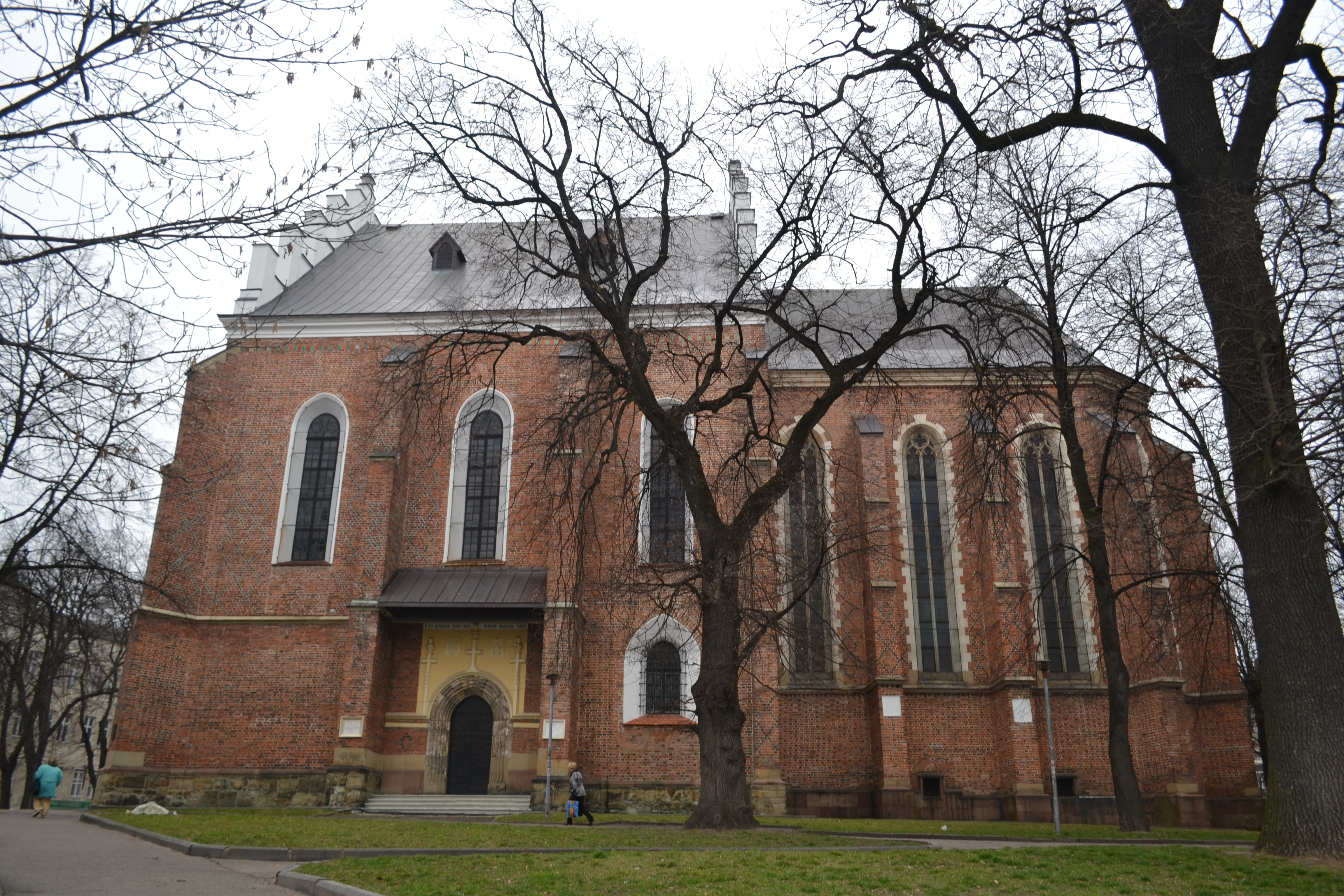 Костел Вознесіння Господнього (мур.), Дрогобич, вул.Т.Шевченка, 1